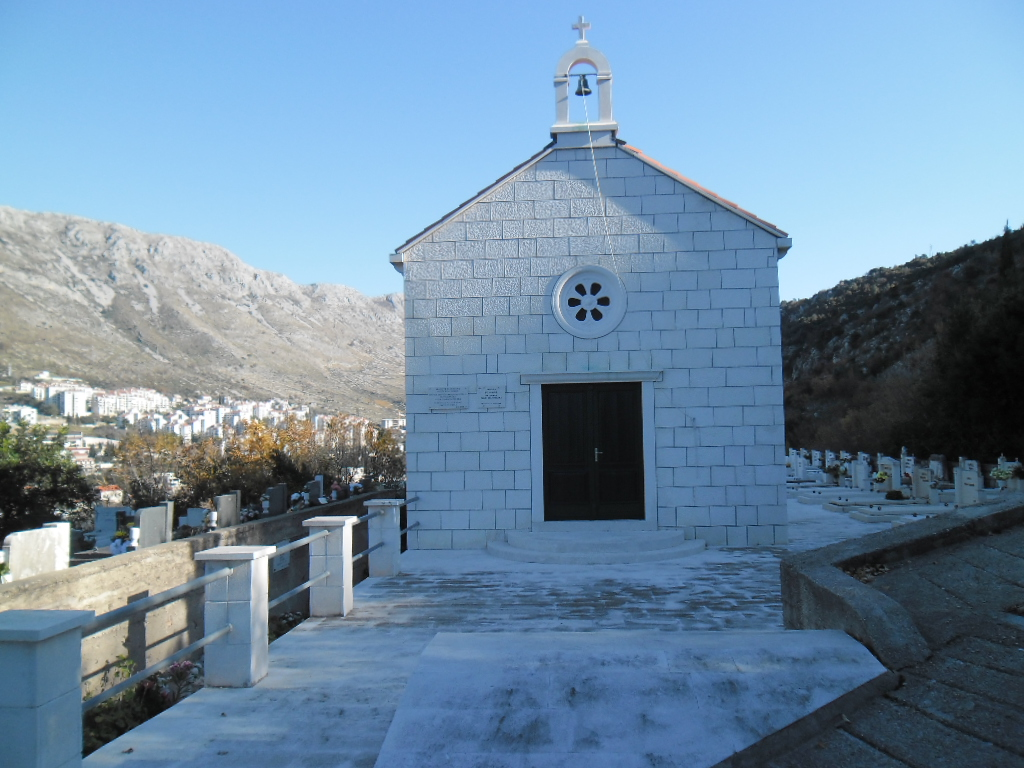 crkva u Sustjepanu